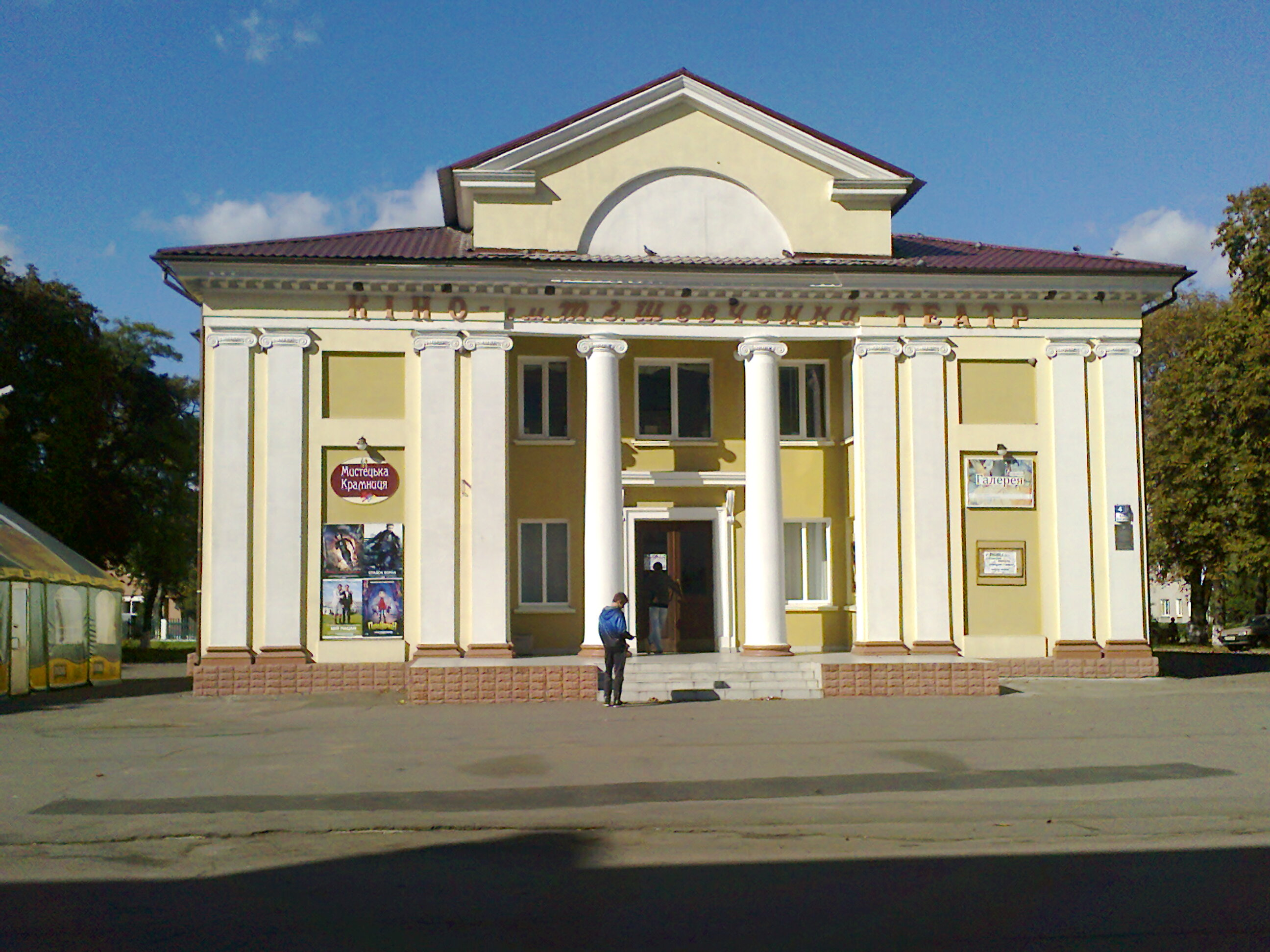 Кінотеатр ім. Т.Г. Шевченка 1960р. м. Володимир-Волинський. З південного боку. Фронтальний вигляд.